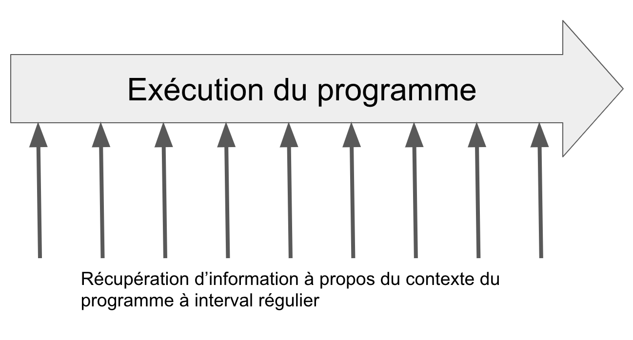 On peut voir le programme se faire interrompre à interval régulier par le profileur.